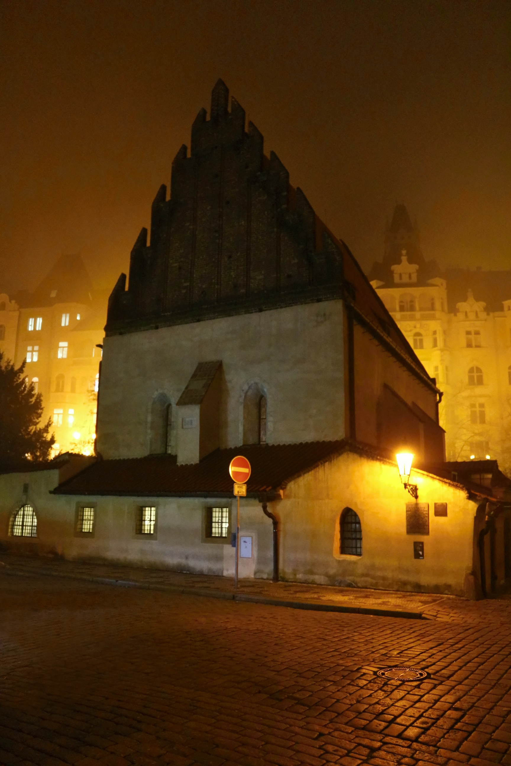 Praha 1-Josefov, Staronová synagoga